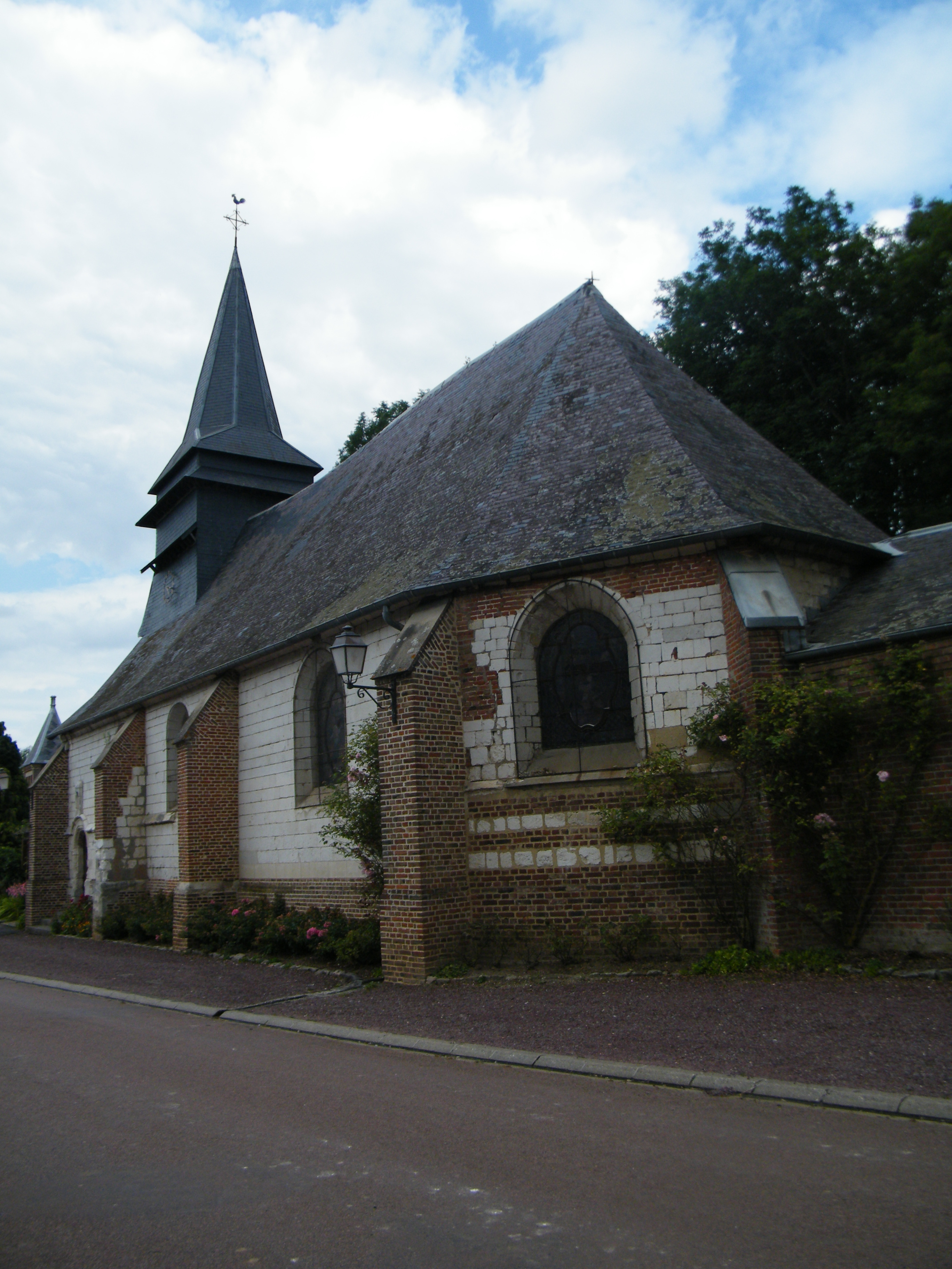 église.